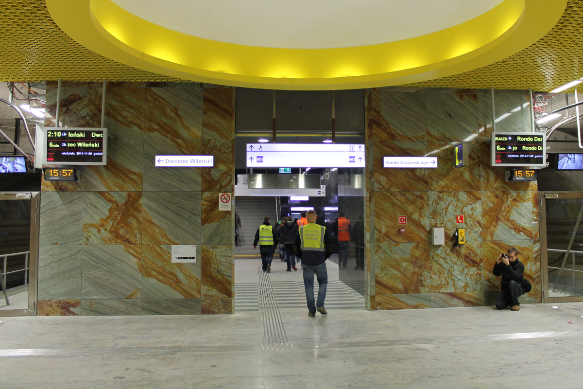 Wejście z peronu stacji C11 Świętokrzyska do łącznika prowadzącego na peron stacji A14 Świętokrzyska.